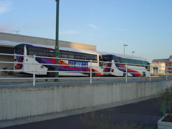 鹿児島南ふ頭・九産交バス